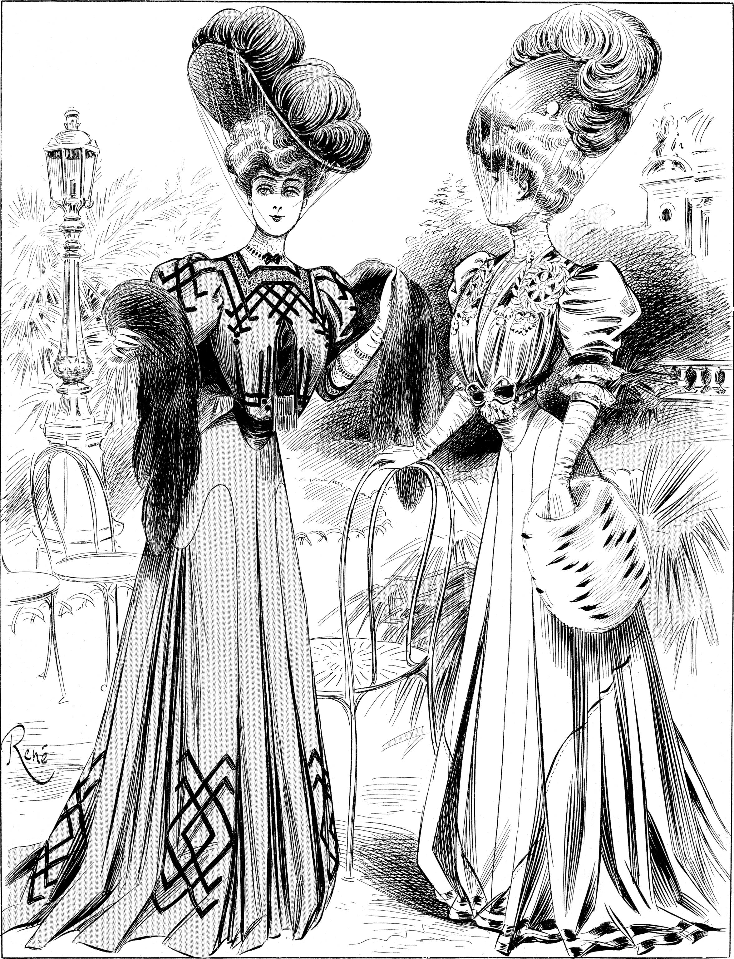 Costymes Tailleur par Armand et Martial